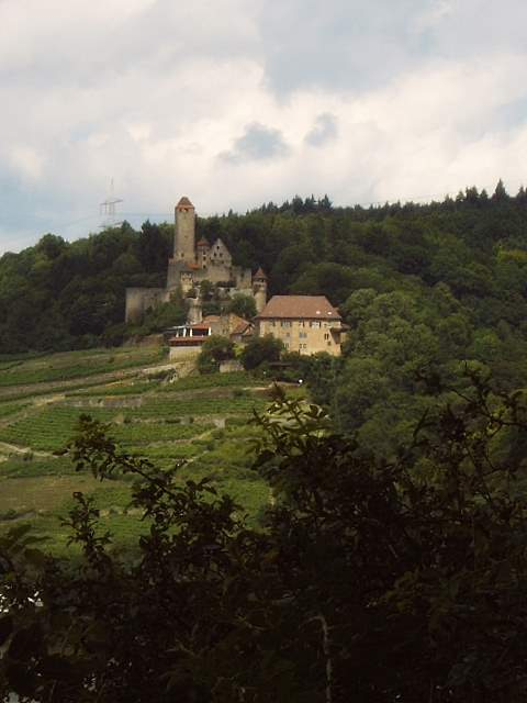 Burg Hornberg Südansicht